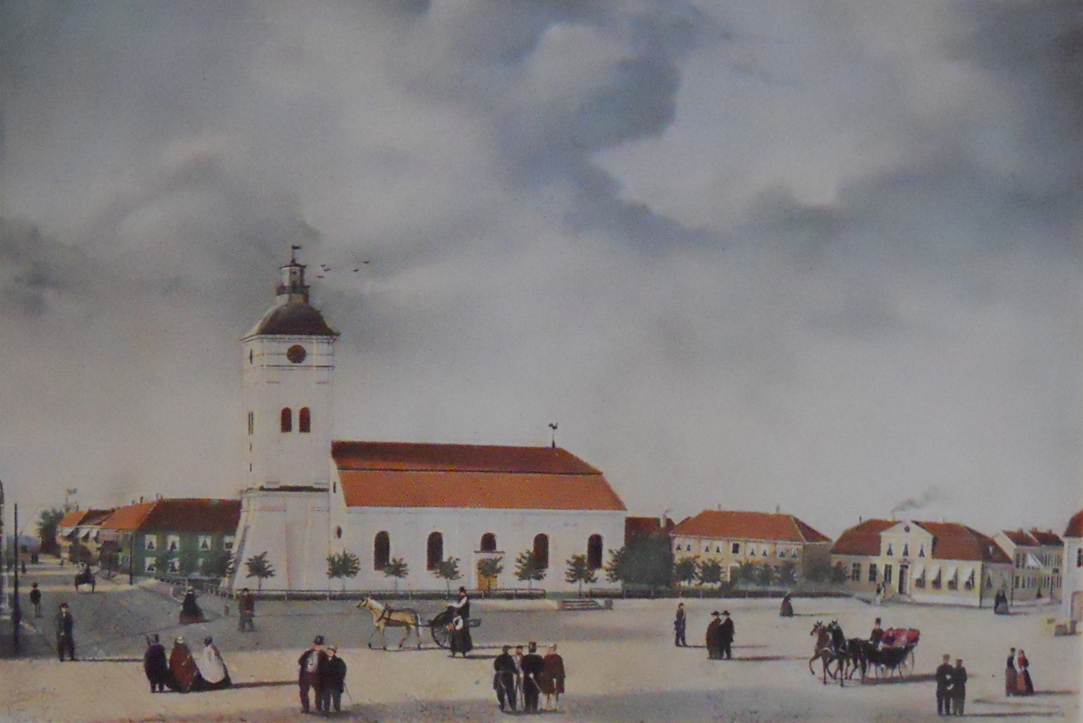 Varbergs kyrkalabel QS:Lsv,"Varbergs kyrka"